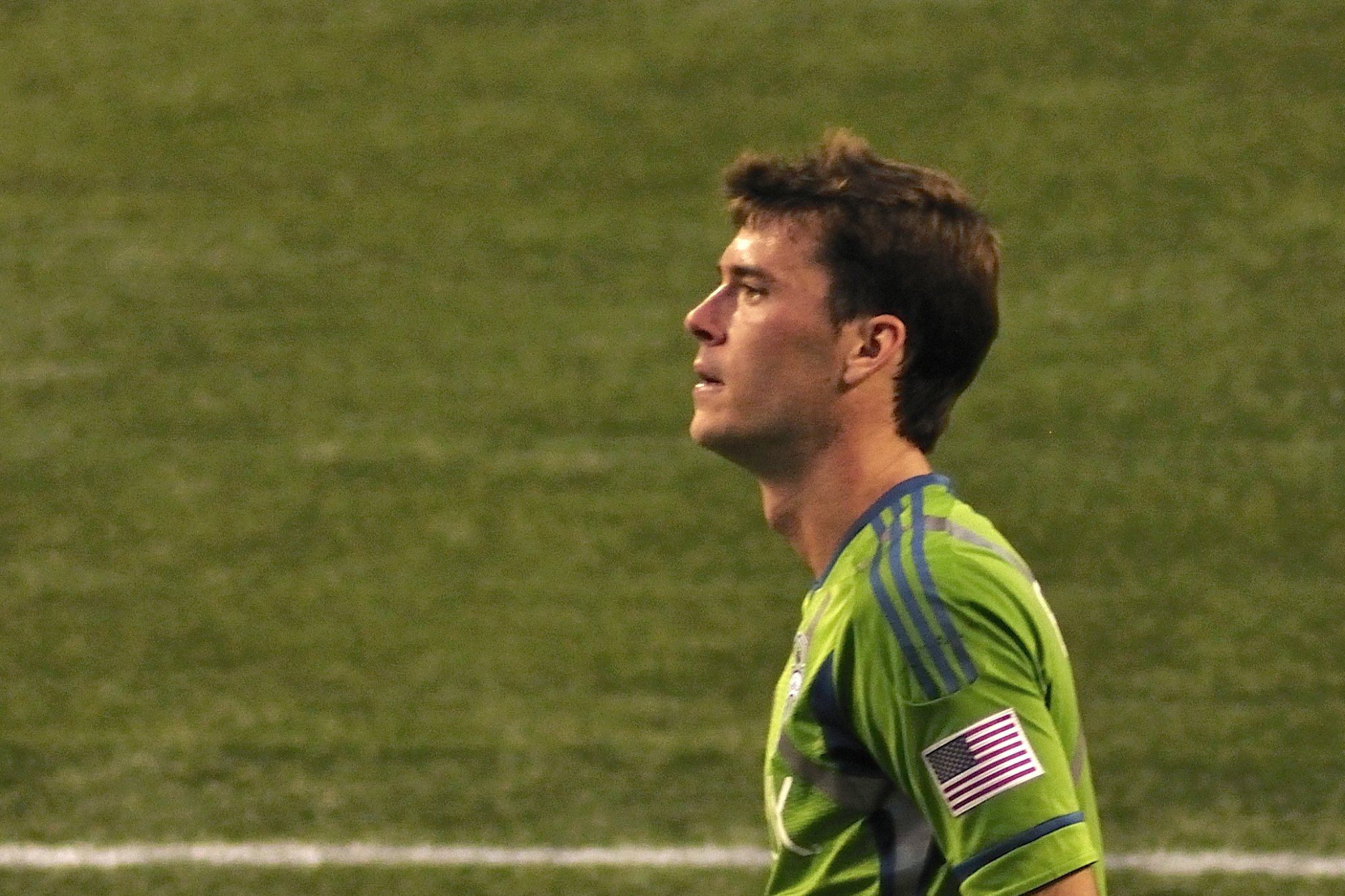 SSFC v VanWCaps_20110611_043